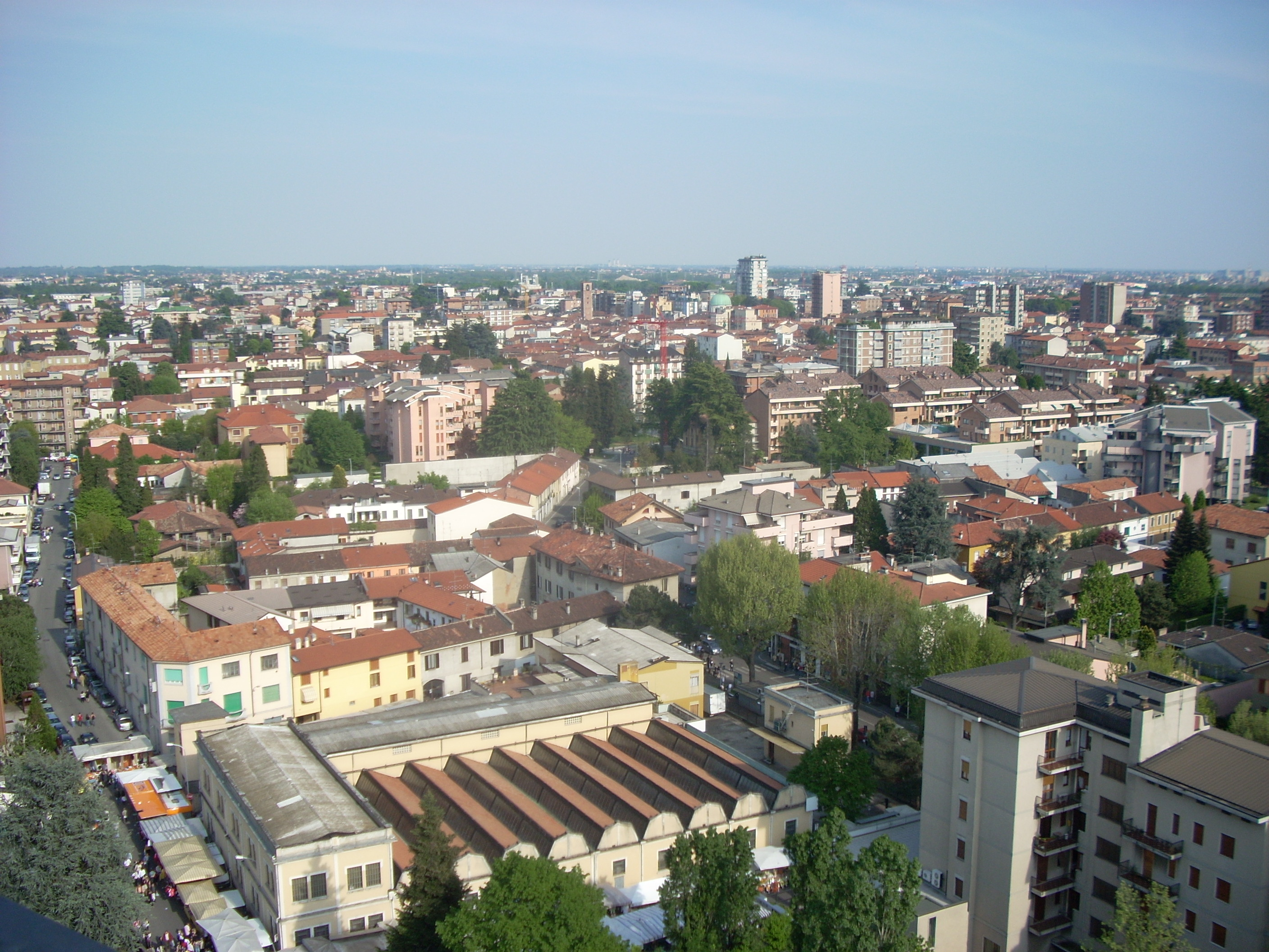 Francesco Silva. Seregno centro: si notino, sullo sfondo, la Torre del Barbarossa e la cupola della Basilica Collegiata.